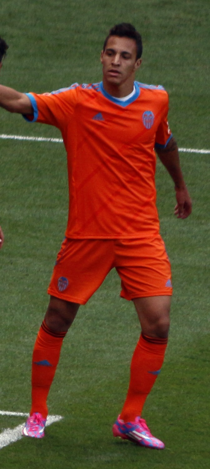 Emirates Cup, 3 d'agost de 2014.